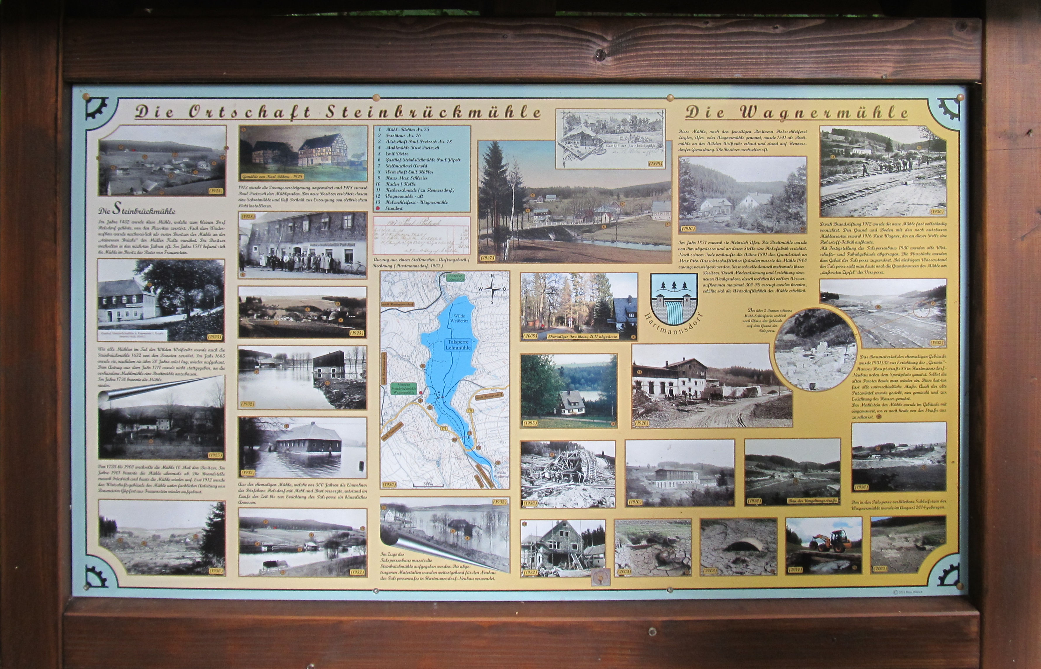 Infotafel zur Ortsgeschichte von Steinbrückmühle, Talsperre Lehnmühle, Gemeinde Hartmannsdorf-Reichenau, Sachsen